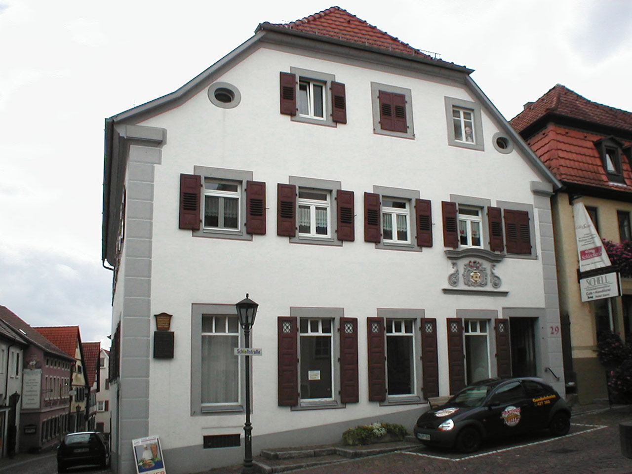 Ehemalige Deutschordens-Bannwirtschaft in der Schloßstraße in Gundelsheim. Am gebäude befindet sich das Wappen des Komturs von Buseck. In diesem gebäude wurde Götz von Berlichingen 1525 zum Feldhauptmann gegen die aufständischen Bauern ernannt.